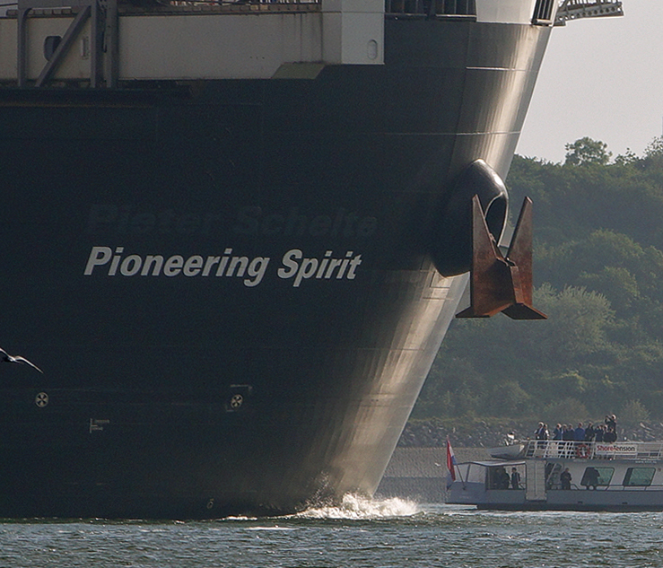 Pioneering Spirit vertrok van Maasvlakte 2 naar de Zwarte Zee 13-5-2017